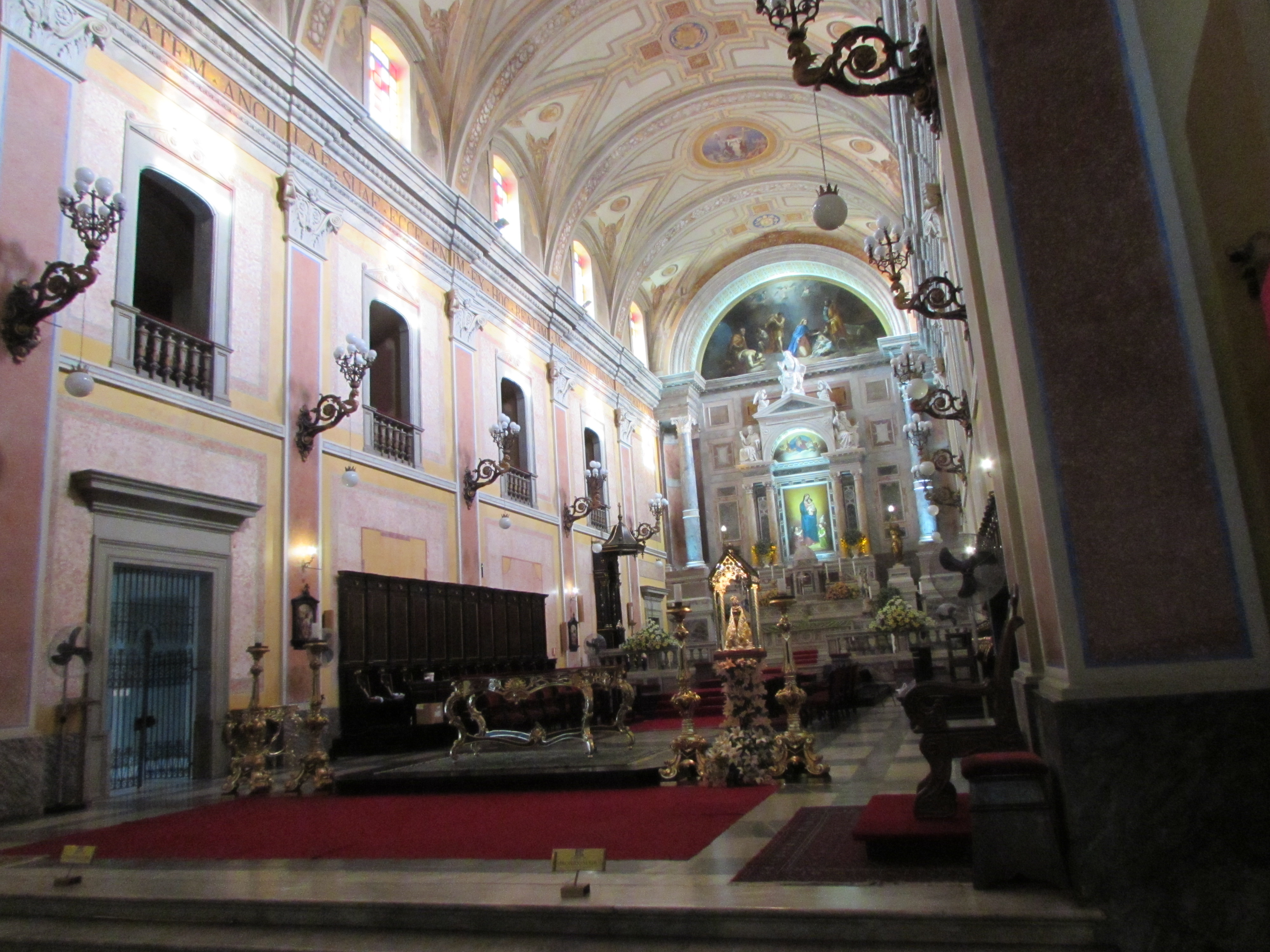 Igreja da Sé